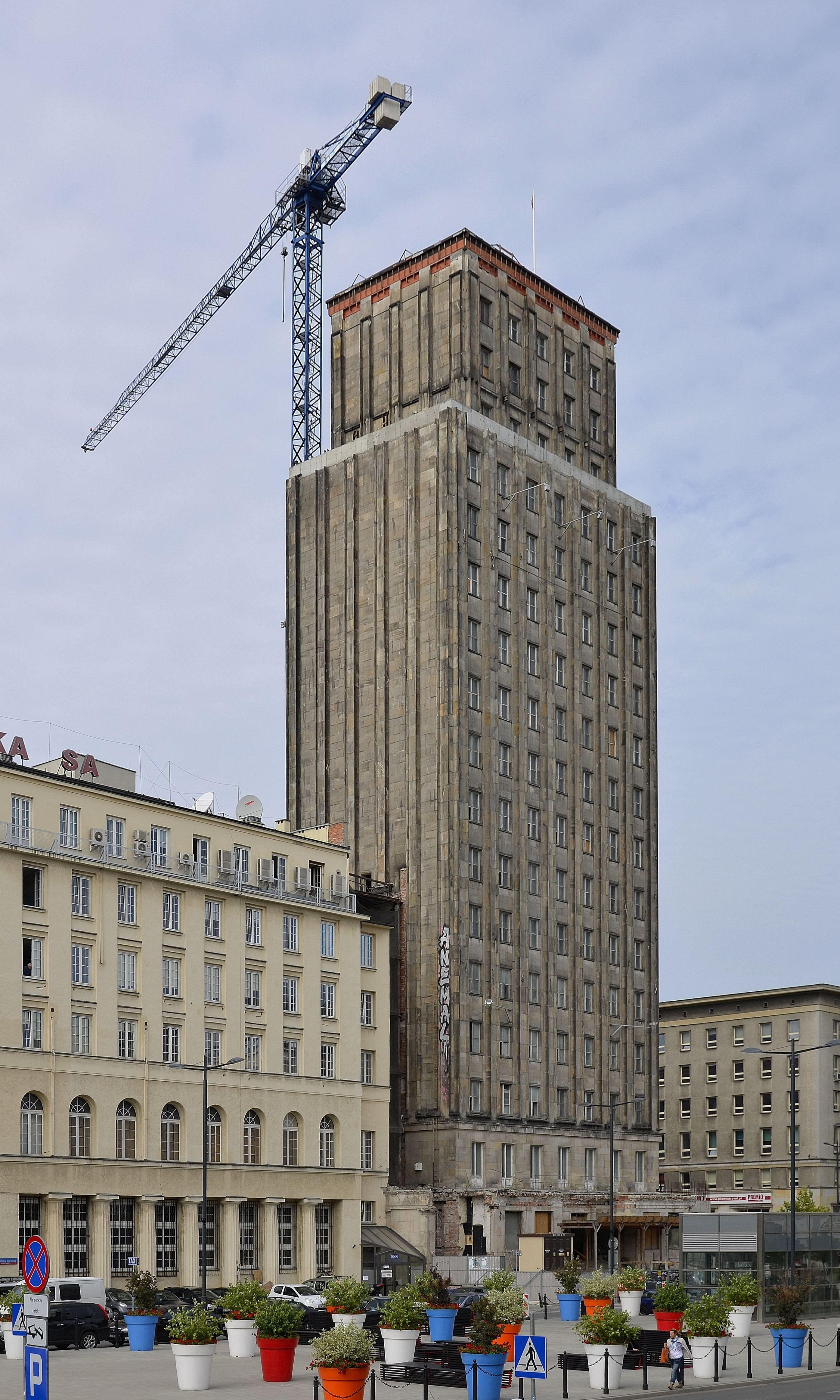 Gmach Prudentialu w Warszawie